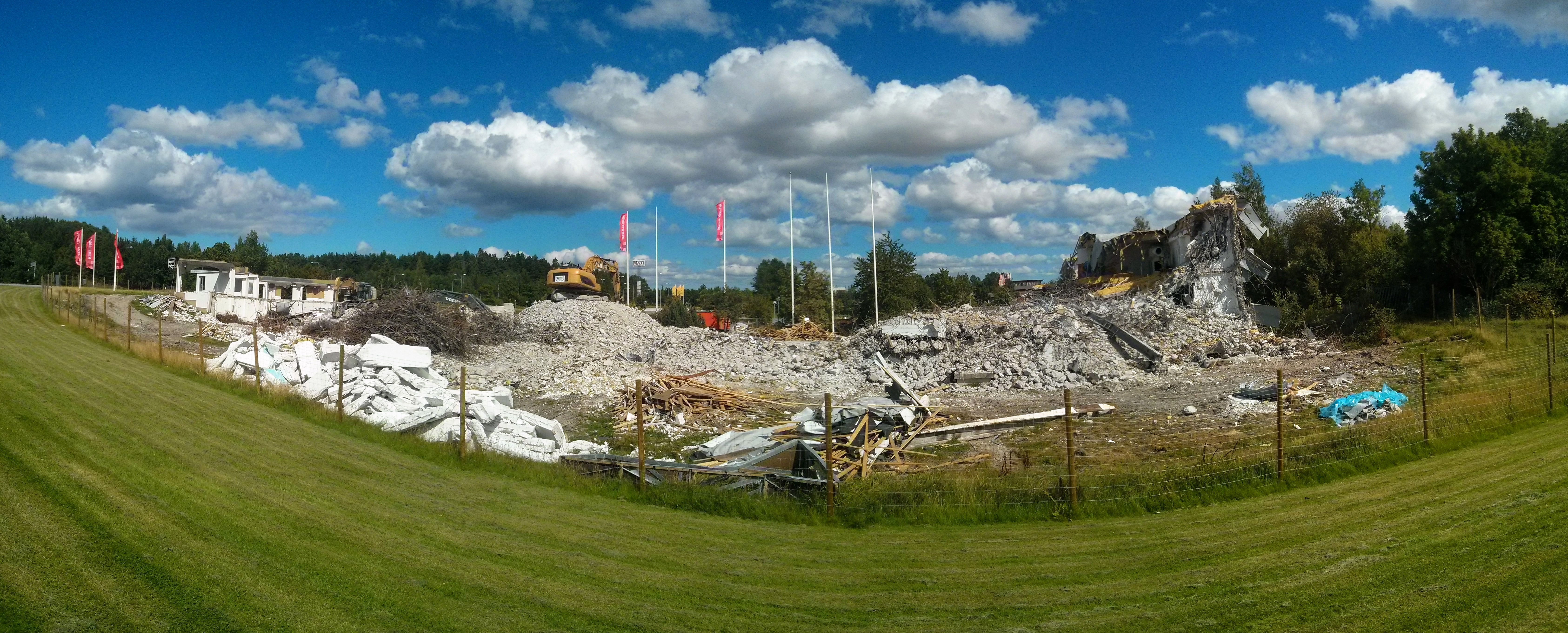 Förbättrad bild på rivningen av Rondellen i Skiftinge, Eskilstuna